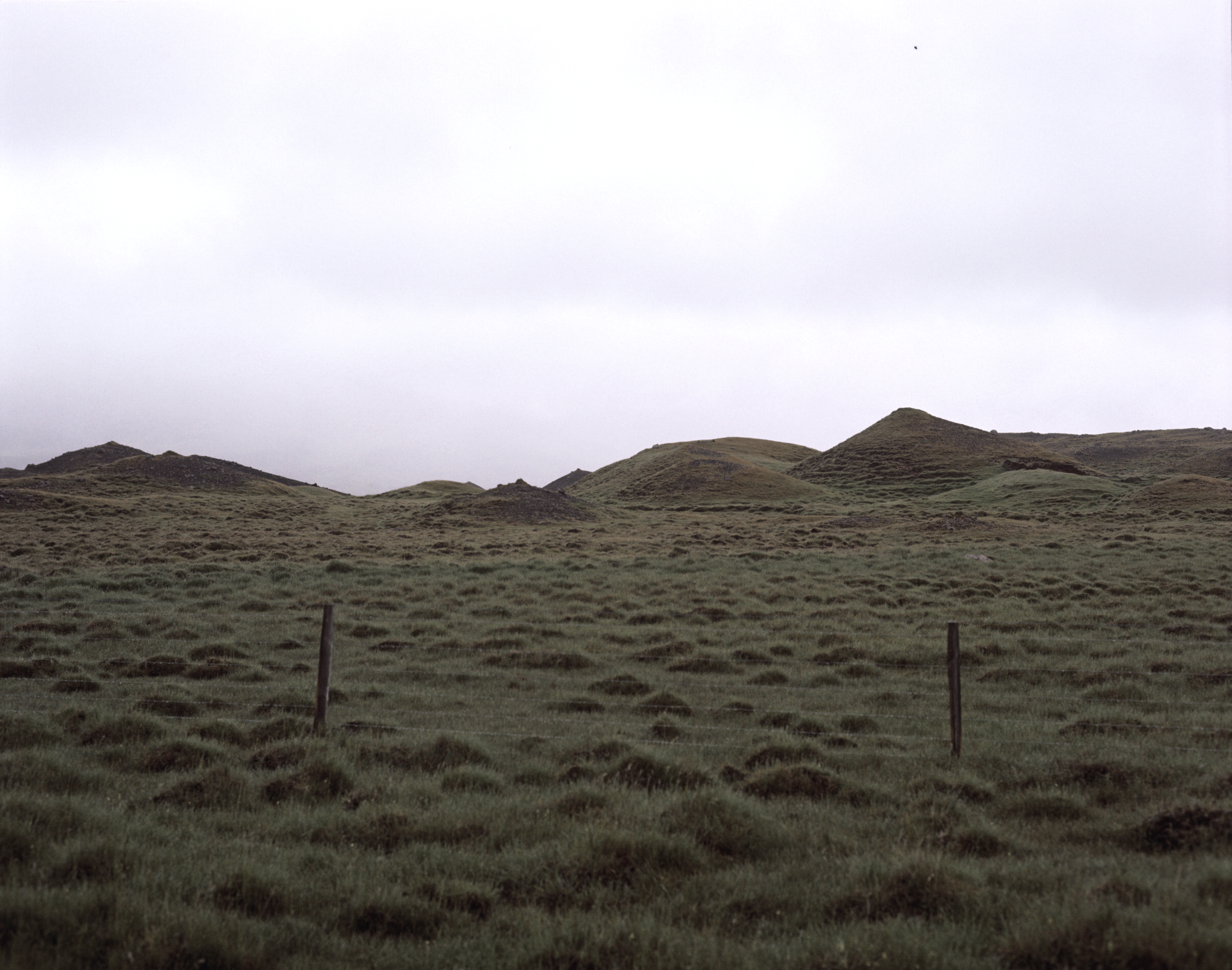 Vatnsdalur. Die Hügel stammen von katastrophalen Erdlawinen im 17. und 18. Jahrhundert. Sie stauten das Wasser des Flusses Vatnsdalsá auf und vernichteten so Weiden mancher ehemals reicher Bauernhöfe.